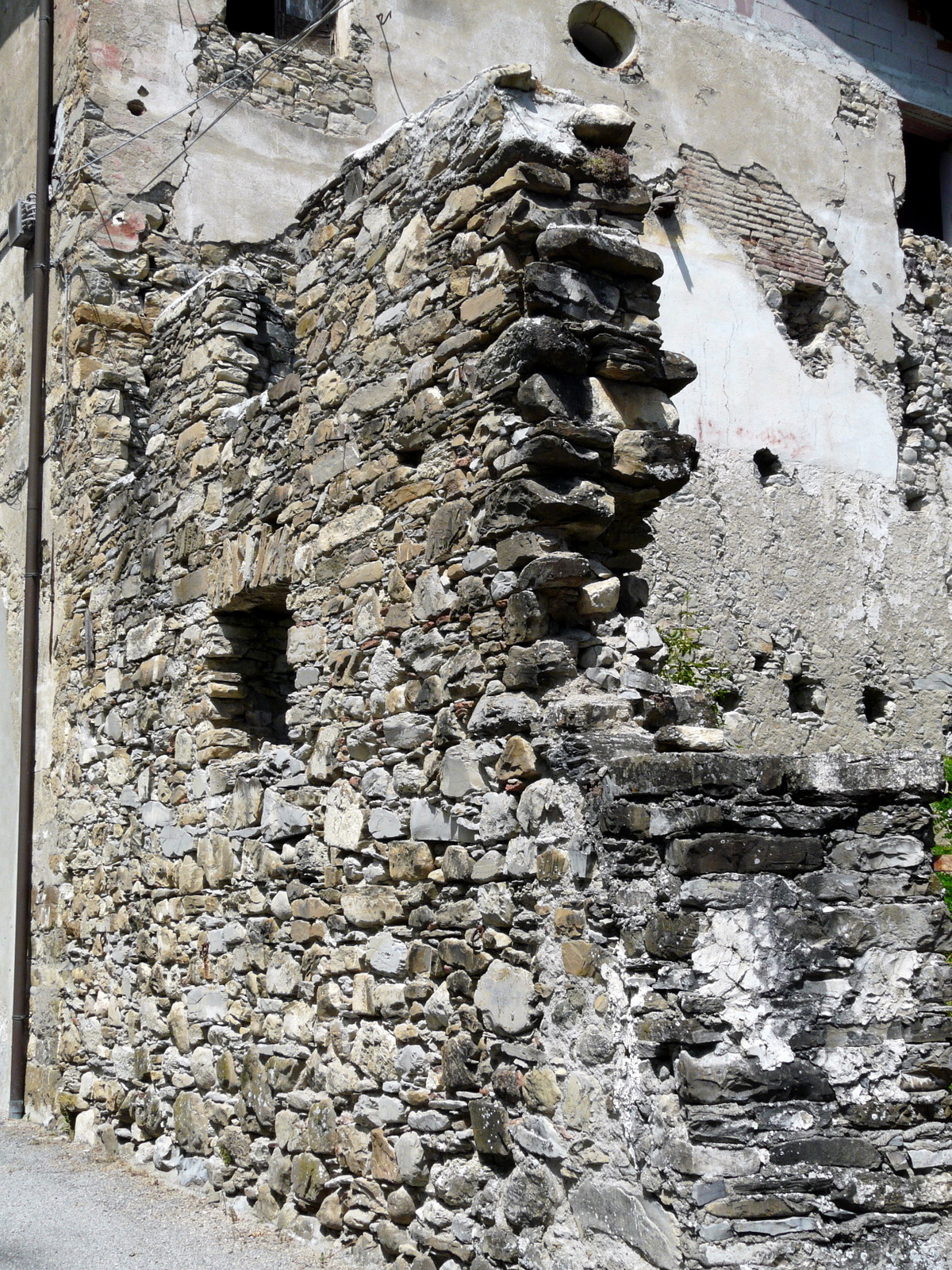 I resti delle mura di Gorreto, Liguria, Italia